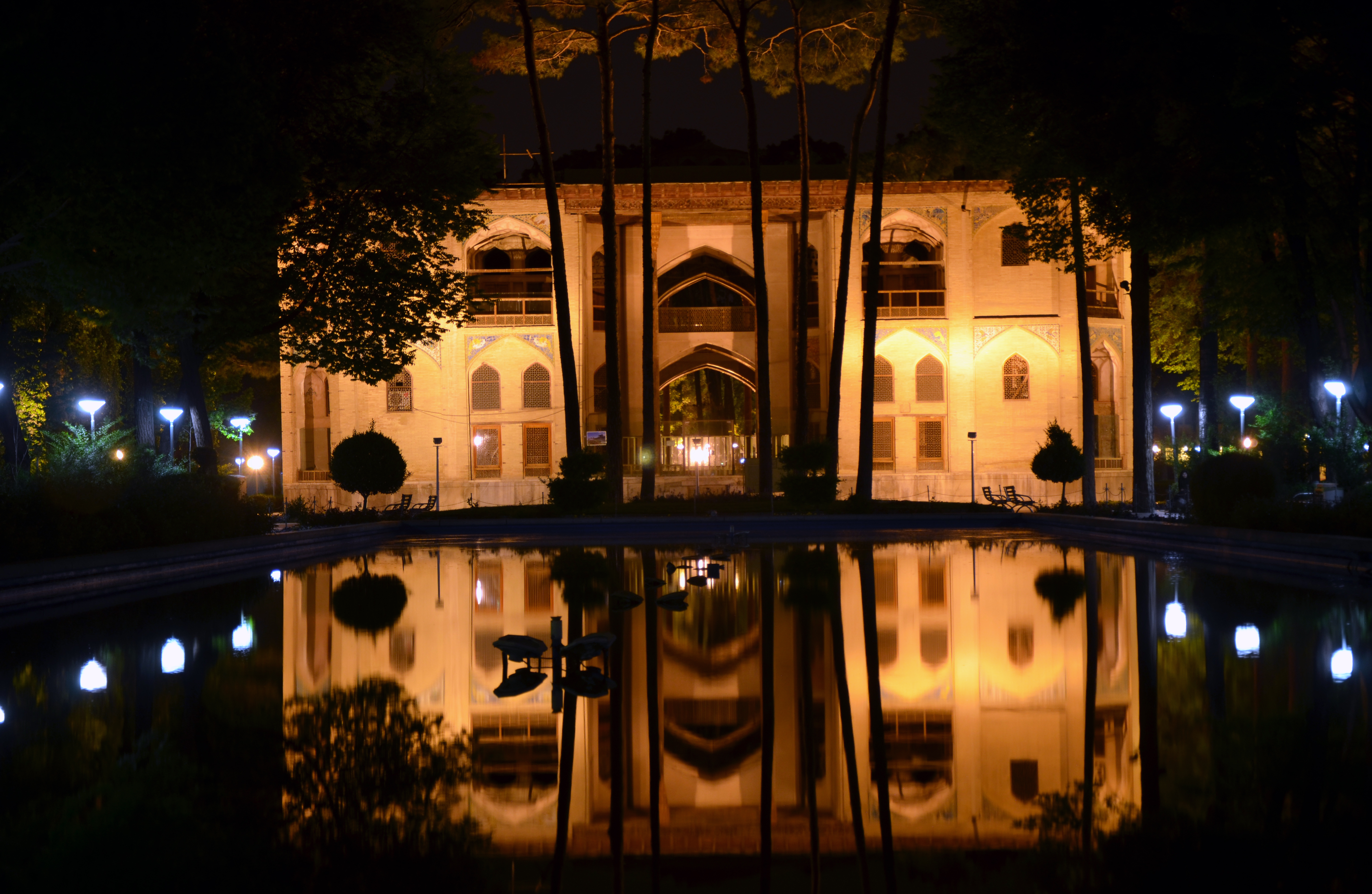 Isfahan - Hasht behesht